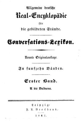 Allgemeine deutsche Real-Encyklopädie für die gebildeten Stände. Conversations-Lexikon. 9. Auflage, Band 1. F. A. Brockhaus, Leipzig 1843